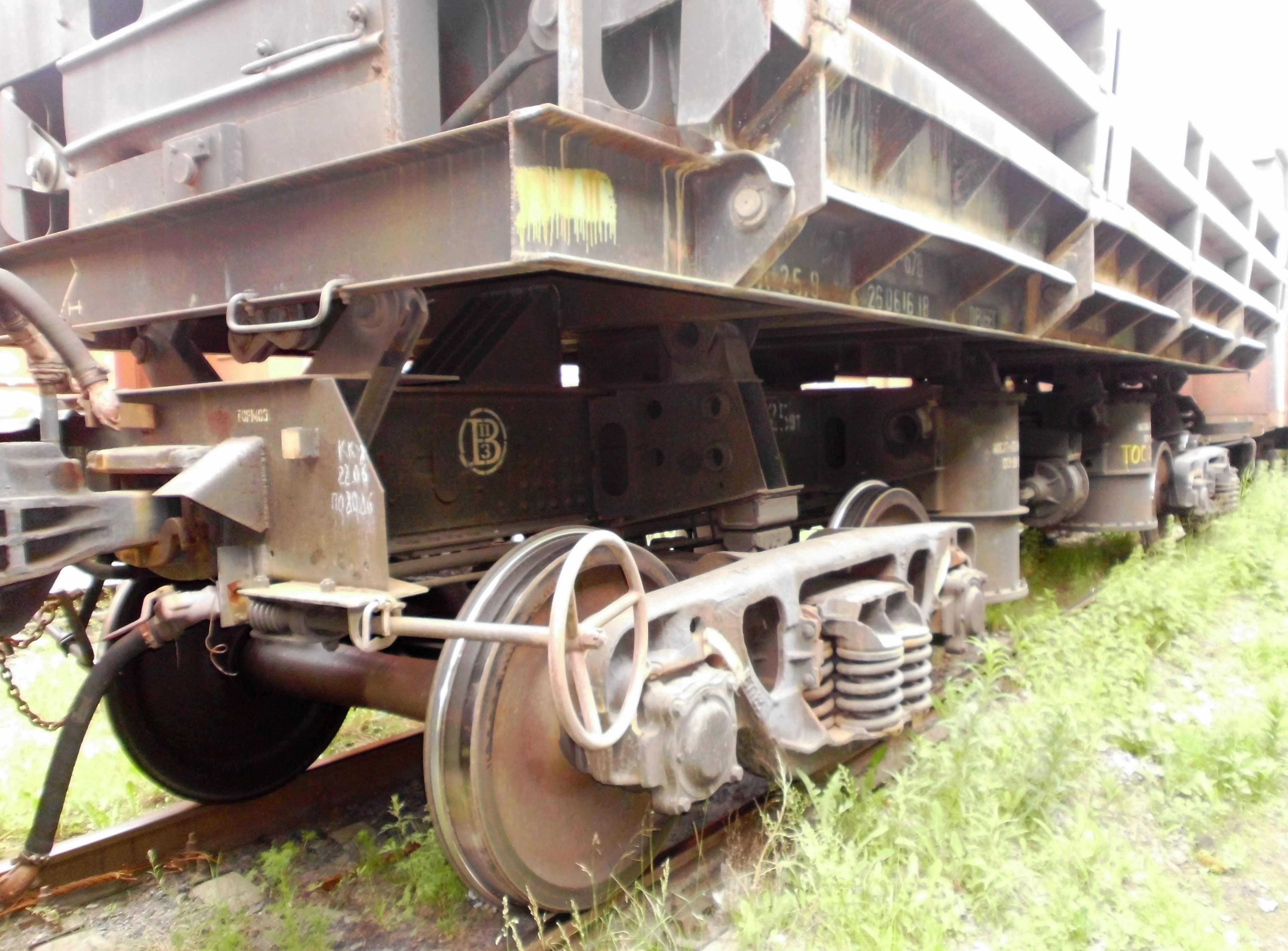 Думкар.